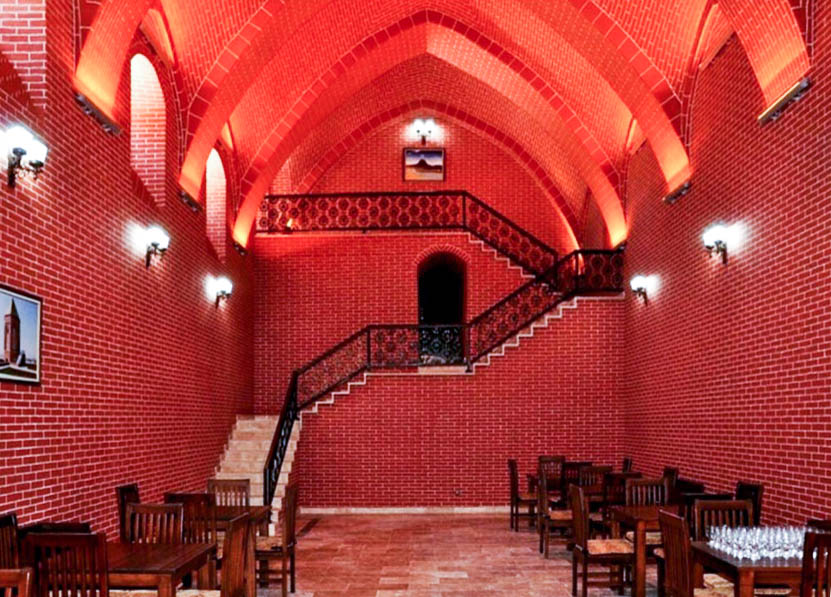 Naxçıvan buzxanasının interyeri